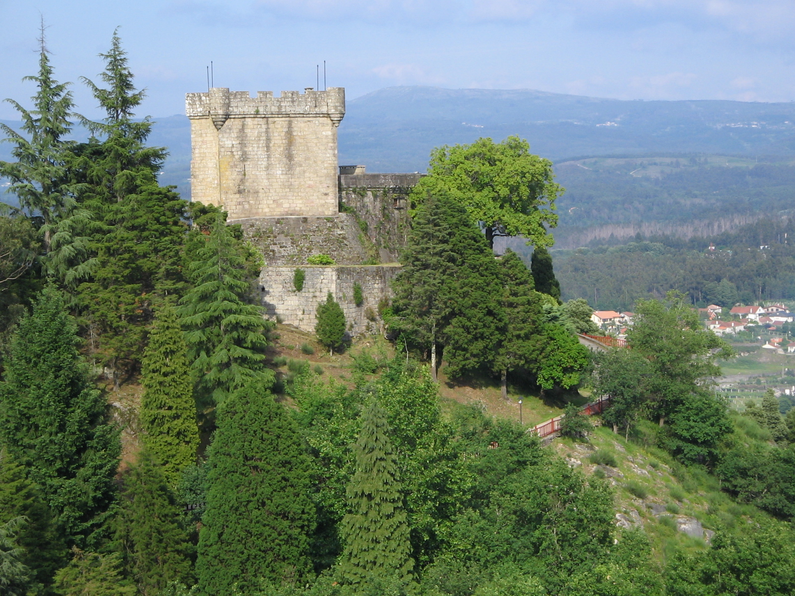 Castelo de Sobroso,Vilasobroso Mondariz, Galicia